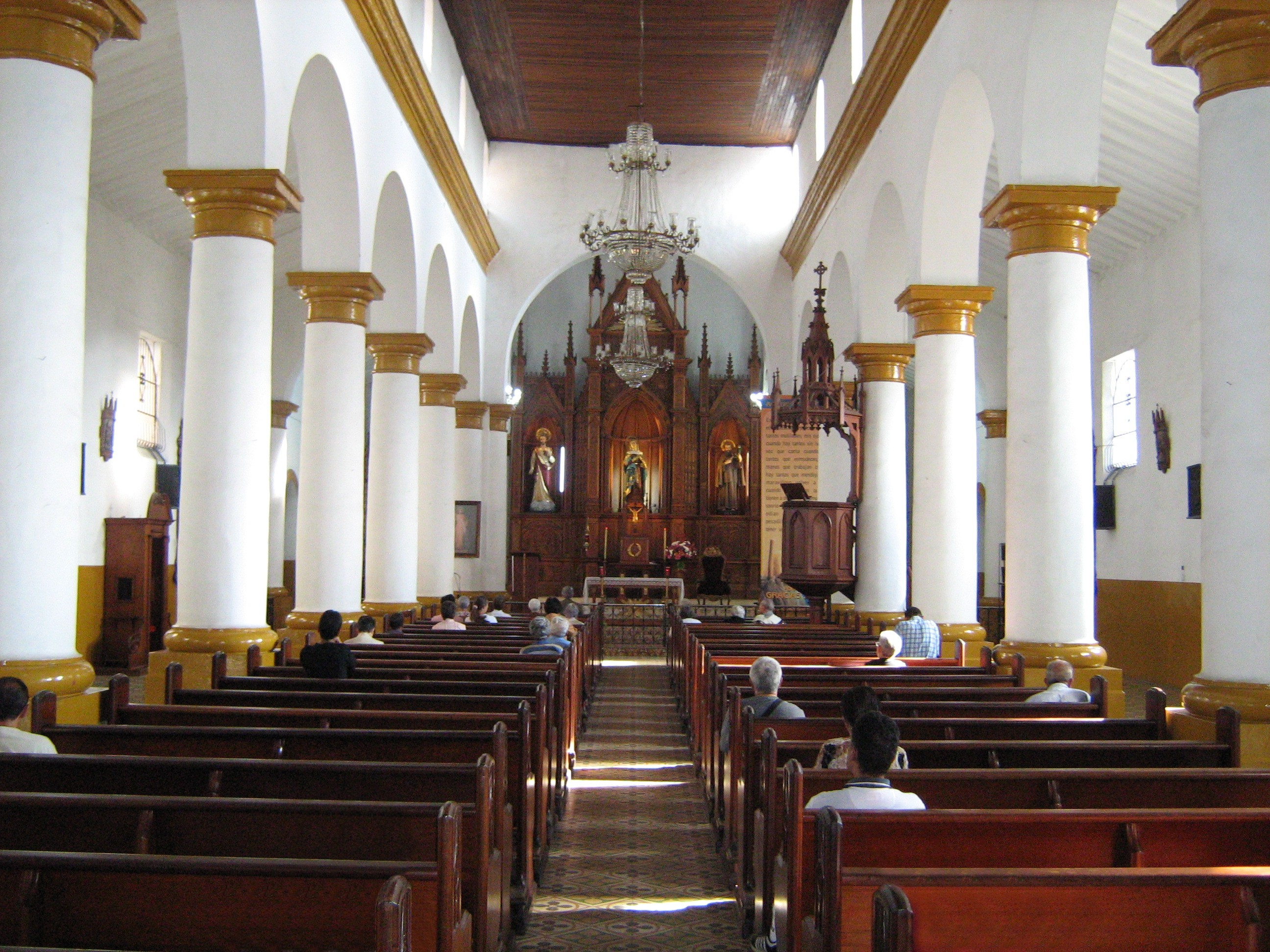 Iglesia de Nuestra Señora de los Dolores del barrio de Robledo en Medellín, Colombia